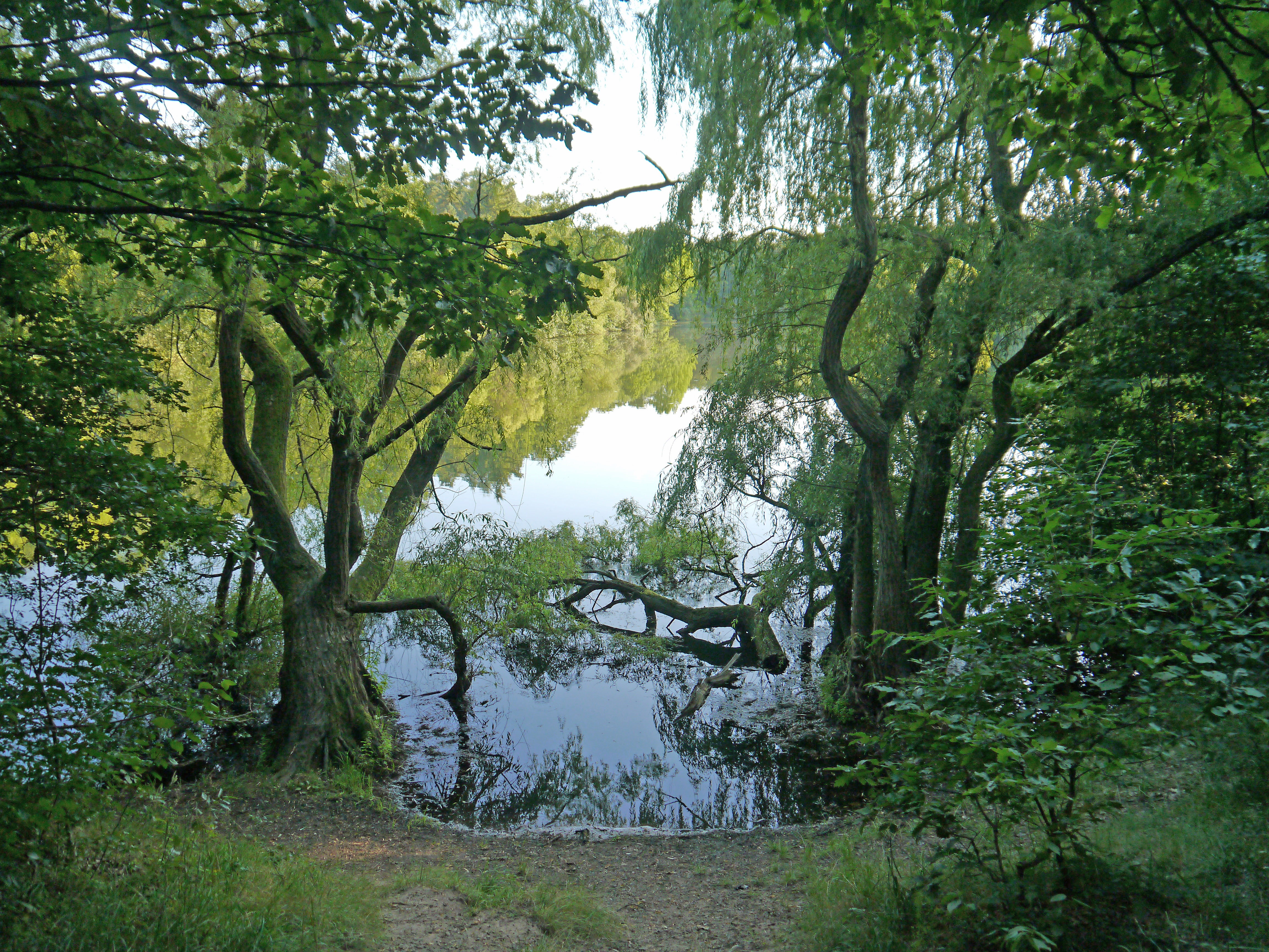 Fechenheimer Weiher. Blick 2012 vom Nordufer, in F-Fechenheim.